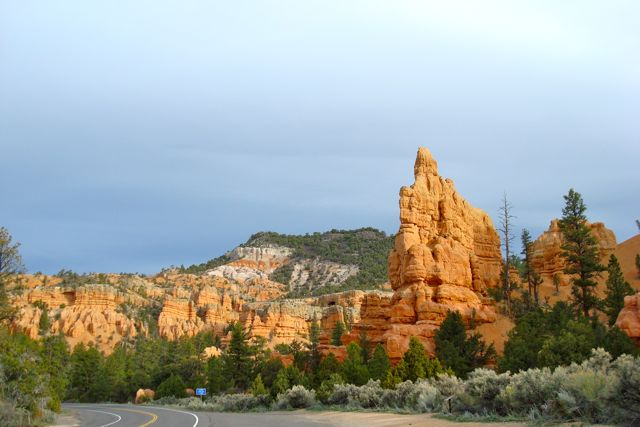 State Route 12 im Red Canyon (Dixie National Forest)